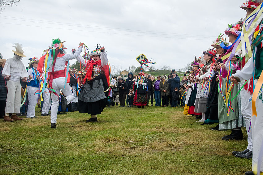 Baile da muiñeira cruzada no Entroido de Samede